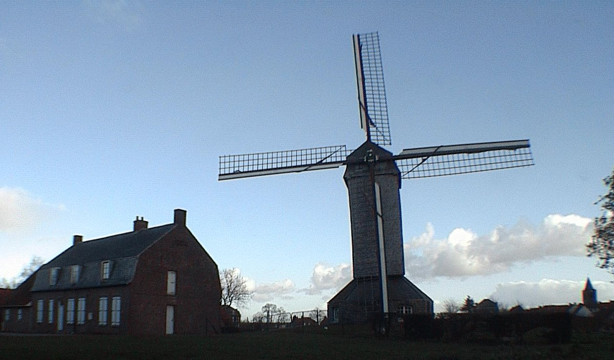 Boeschepe (le vierpot - le moulin - l'église)